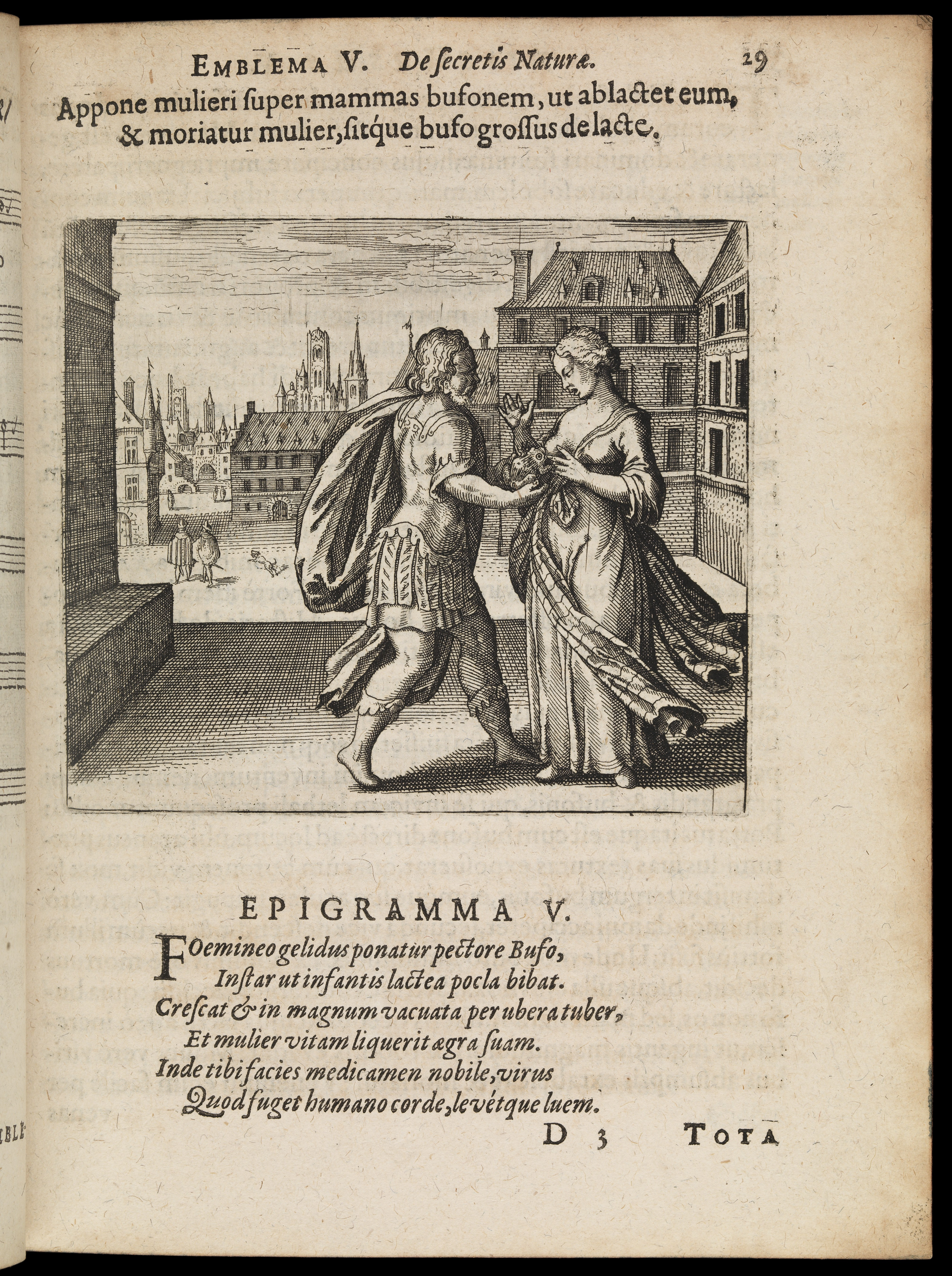 Atalanta fvgiens, hoc est emblemata nova de secretis naturae chymica. Accommodata partim oculis et intellectui, figuris cupro incisis, adjectisq´ue sententiis, epigrammatis et notis, partim auribus et recreationi animi plus minus 50 fugis musicalibus trium vocum, quarum duÆ ad unam simplicem melodiam distichis canendis peraptam, correspondeant ... / authore Michaele Majero. Epigramma V. Rare Books Keywords: Alchemy